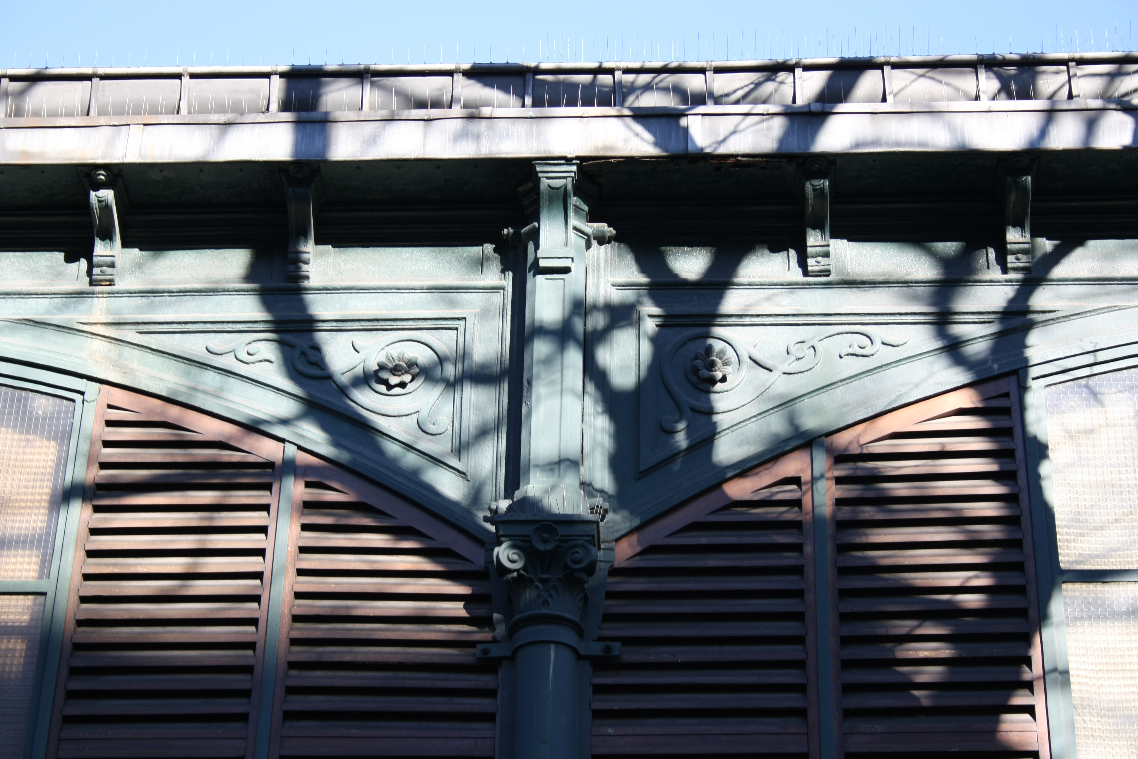 am Markt Secrétan in Paris (19. Arrondissement), Detail der Eisenkonstruktion